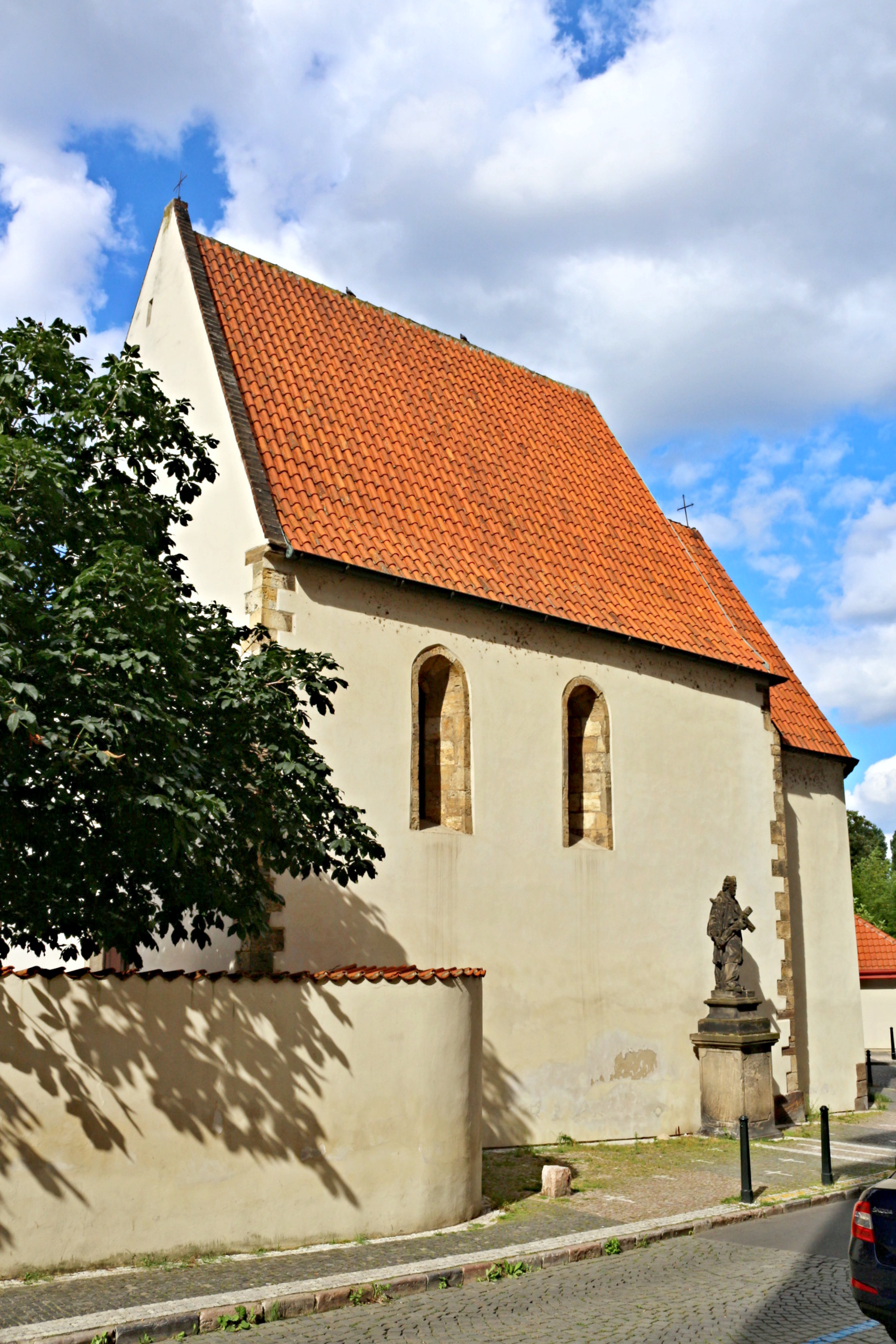 Praha 1-Malá Strana, kostel sv. Jana Na Prádle